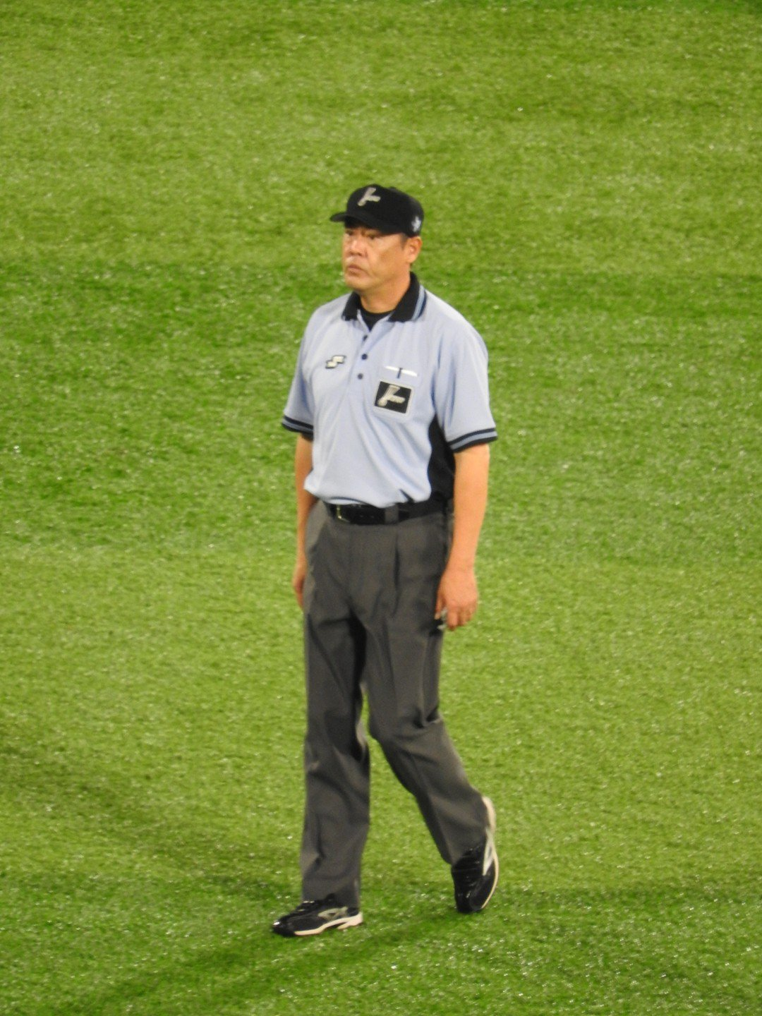 2019年7月16日横浜スタジアムにて